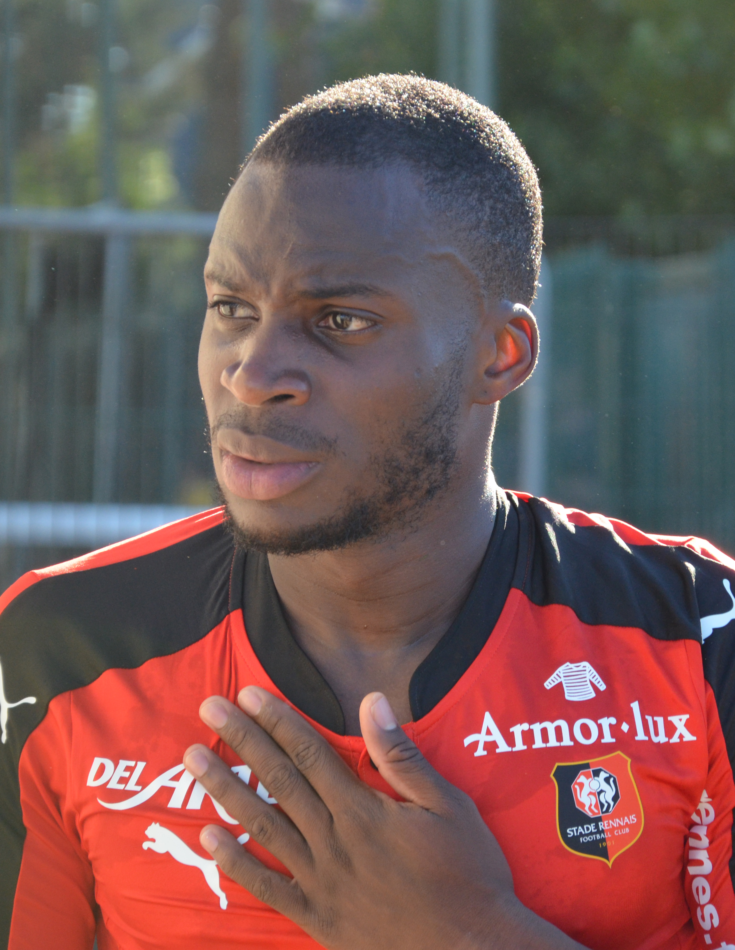 Photographie prise lors du match opposant le Stade rennais à l'USM Alger en match amical au stade Paul-Audrin de Dinard le 16 juillet 2016. Ici, Yacouba Sylla.